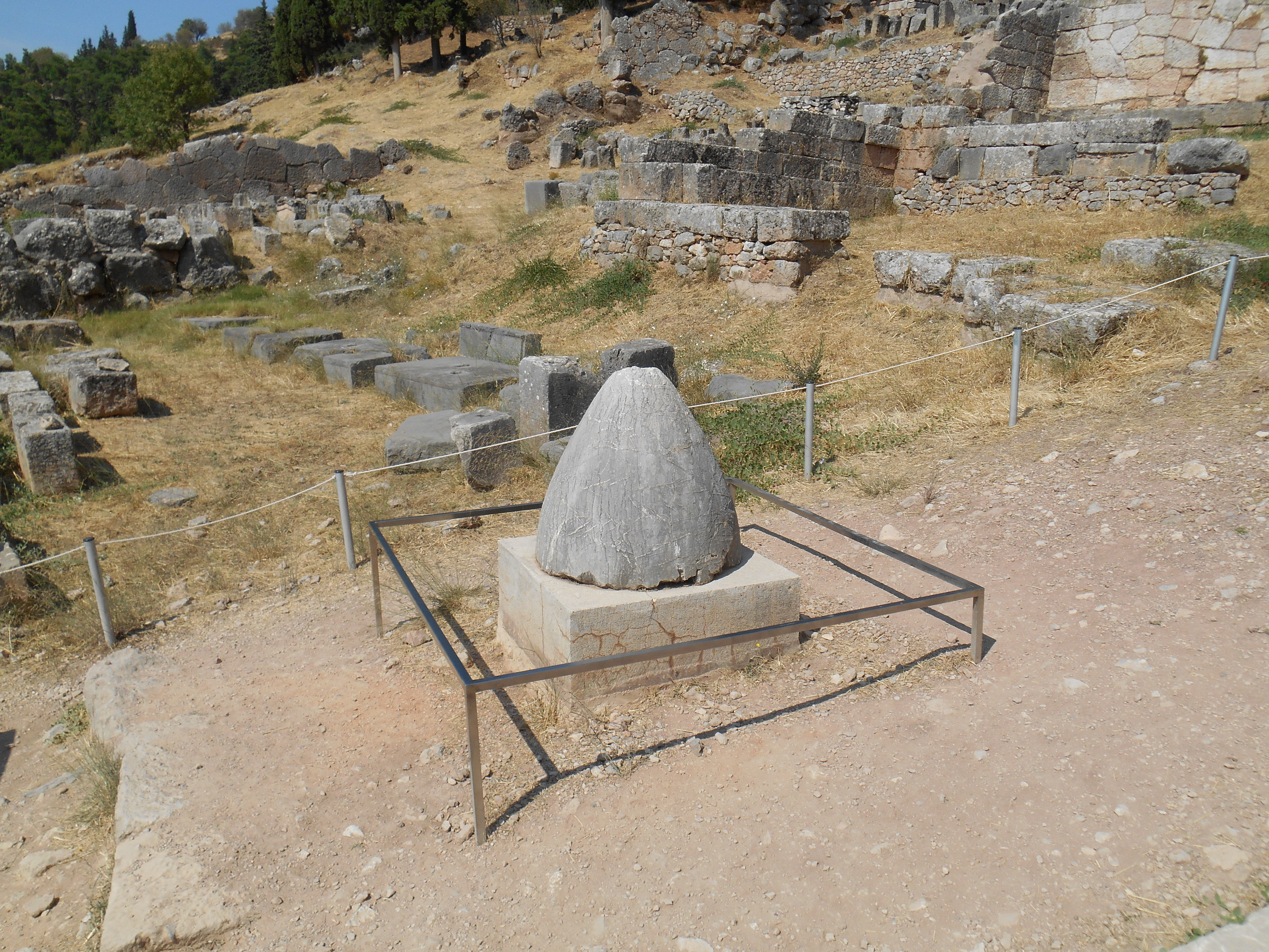 Ο Ομφαλός της γής στους Δελφούς, σε αυτό το σημείο πιστεύεται ότι ήταν το κέντρο της γης